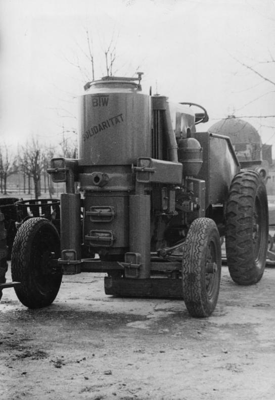 Die Leipziger Frühjahrsmesse 1949 Am 6.3.49 wurde im Leipziger Schauspielhaus die Messe durch den Vorsitzenden der DWK, Heinrich Rau, eröffnet. Auf einer Fläche von 101.997 qm zeigen 6.775 Aussteller aus allen Zonen Deutschlands und dem Ausland ihre Erzeugnisse. Bereits am ersten Tag waren 60.000 Besucher anwesend. Brandenburgische Traktorenwerke VEB; Der Holzgasstrecker "Solidarität". 2906-49